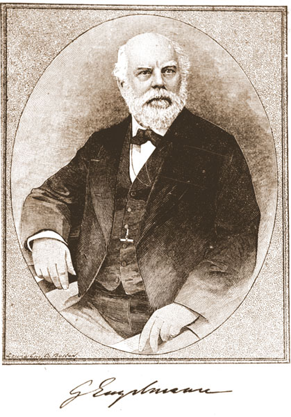 Bildbeschreibung: Georg Engelmann (1809-1884) deutscher Arzt und Botaniker in Saint Louis, USA Quelle: englische Wikipedia Fotograf/Zeichner: ... Datum: ... andere Versionen: ...